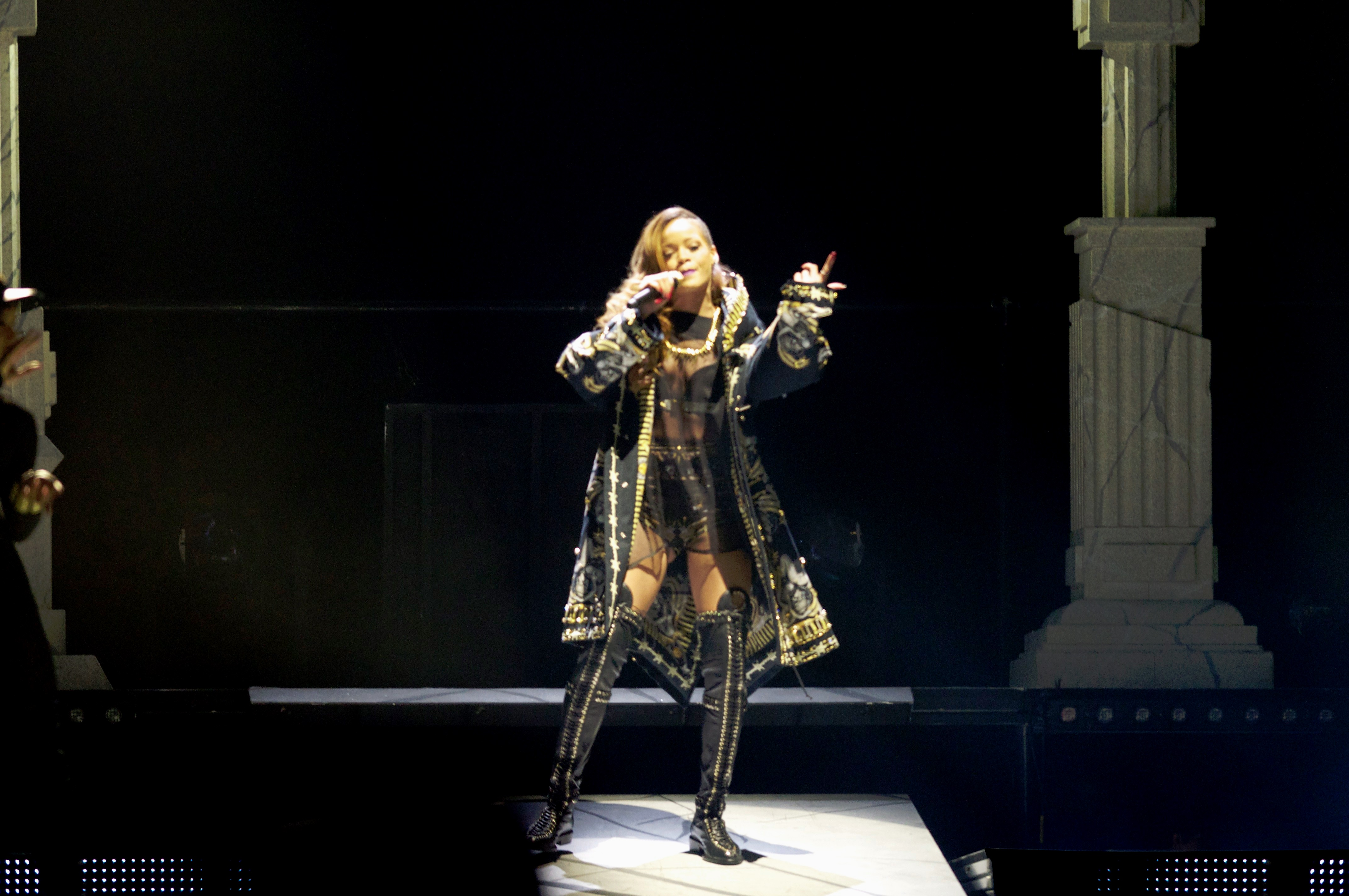 Rihanna-DSC_3248- 3.24.2013